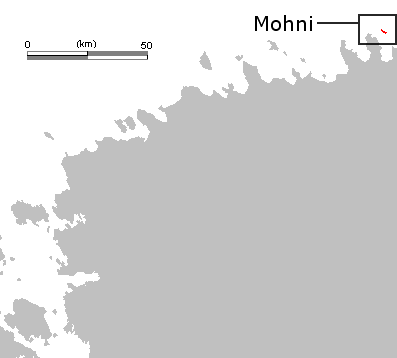 Mohni